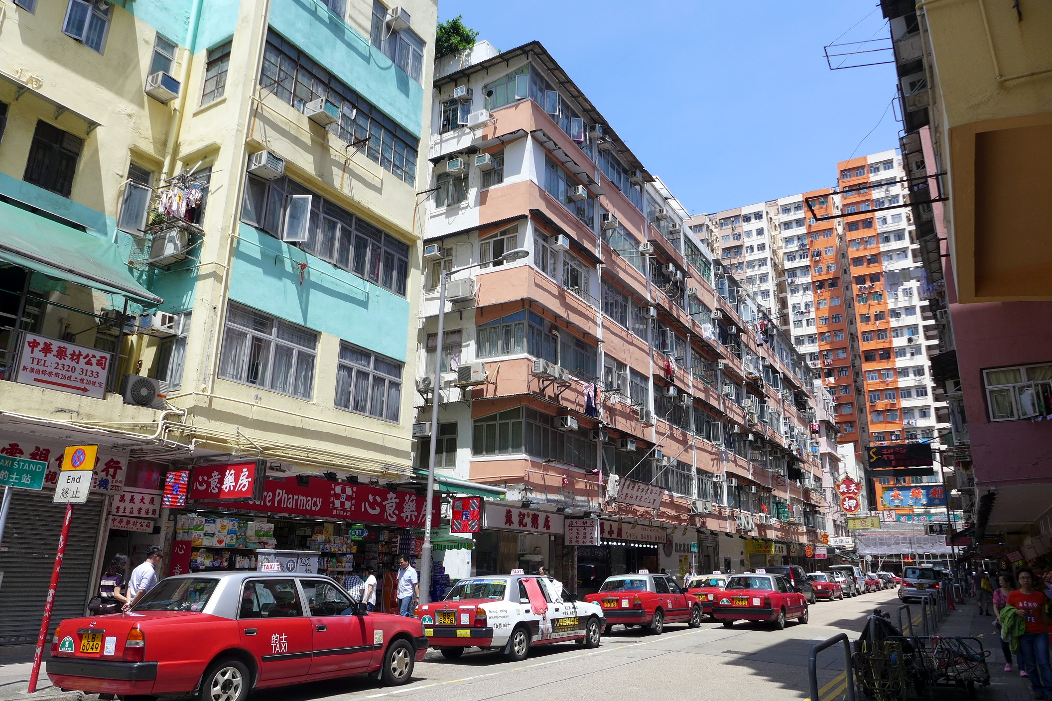 Kam Wing Street, San Po Kong